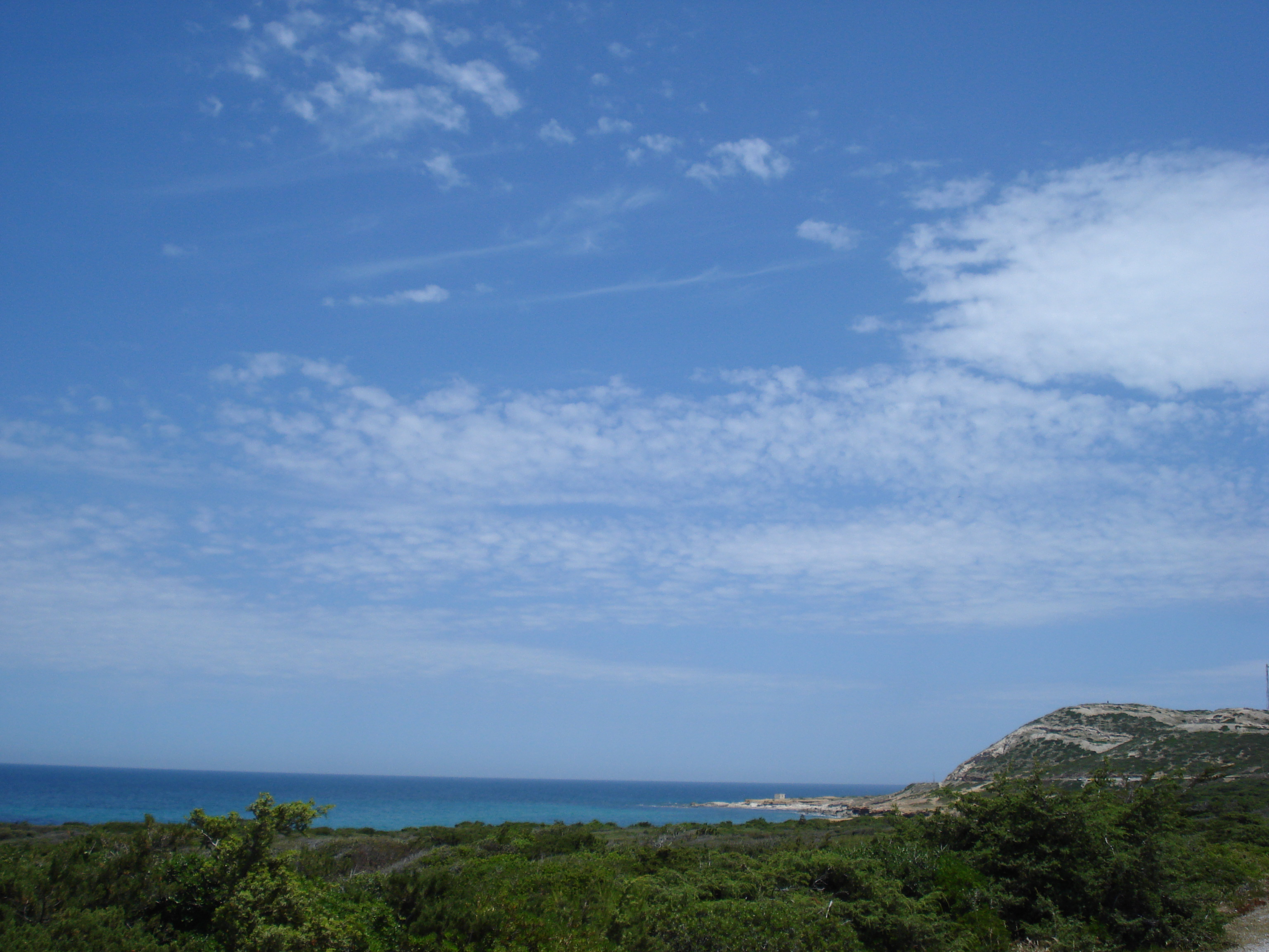 Cap de Bizerte, Tunisie